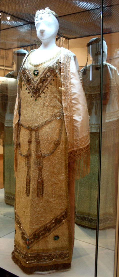 Kostim dramske umjetnice Nine Vavre kao Hasanagnice, Zagreb, oko 1909. godine. Kostim je izrađen za praizvedbu Hasanaginice 9. siječnja 1909. godine, kada je Nina Vavra nastupila u naslovnoj ulozi Hasanaginice, a Andrija Fijan kao Hasan-aga.